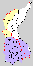 群馬県新田郡の町村。